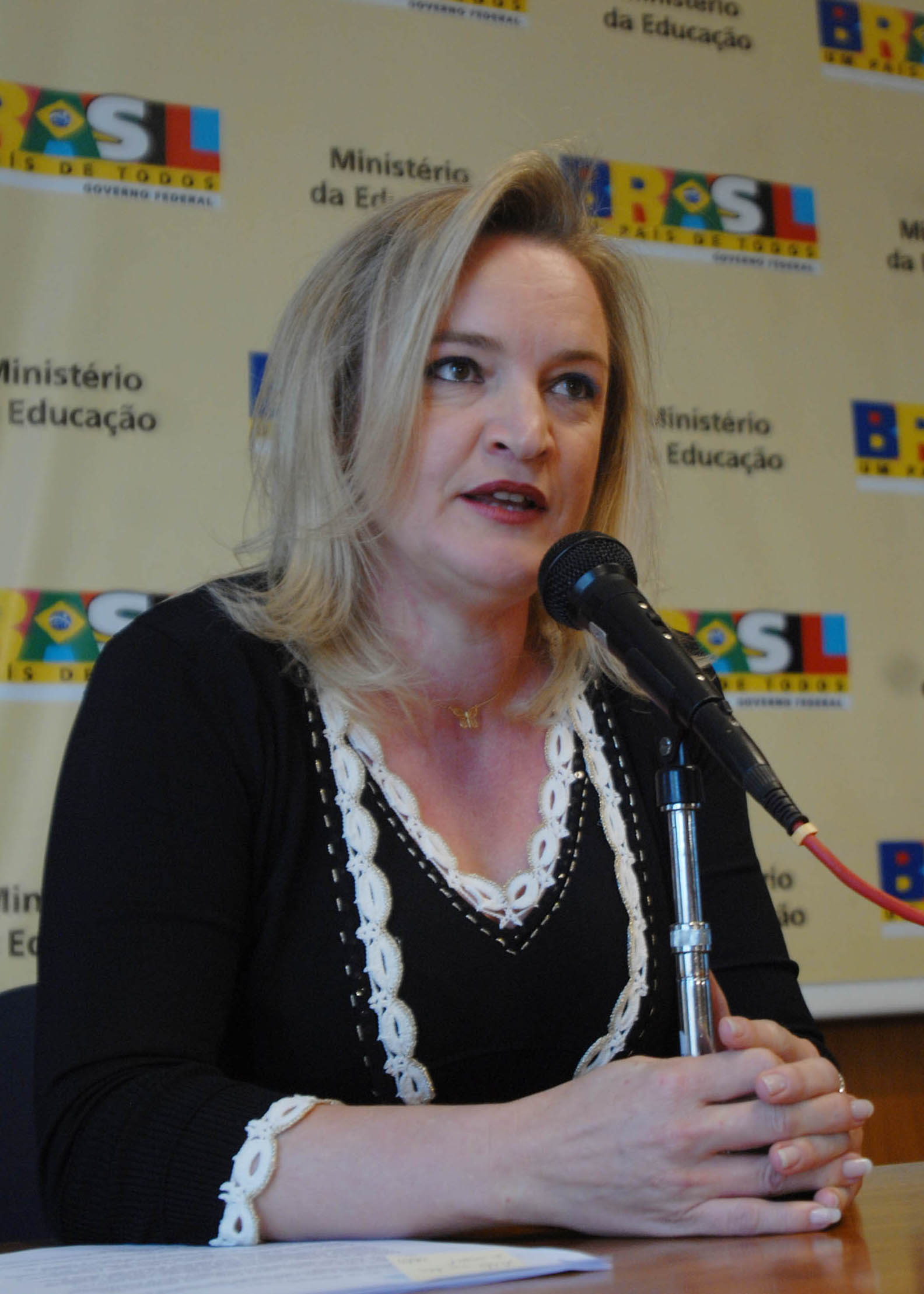 Brasília - A regente da Orquestra Sinfônica Nacional, Ligia Amadio, fala sobre as apresentaçoes que fará na comemoração do 7 de Setembro